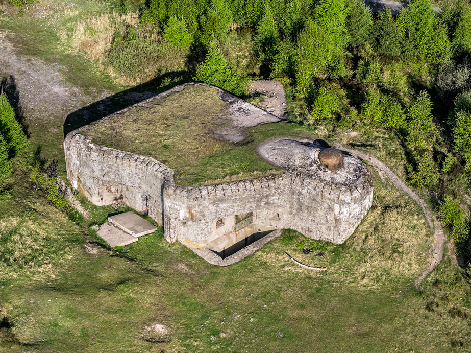 Pokusný pěchotní srub CE Jordán, vojenský újezd Brdy, k. ú. Baština, parcely 5/1, 5/2, Baština.